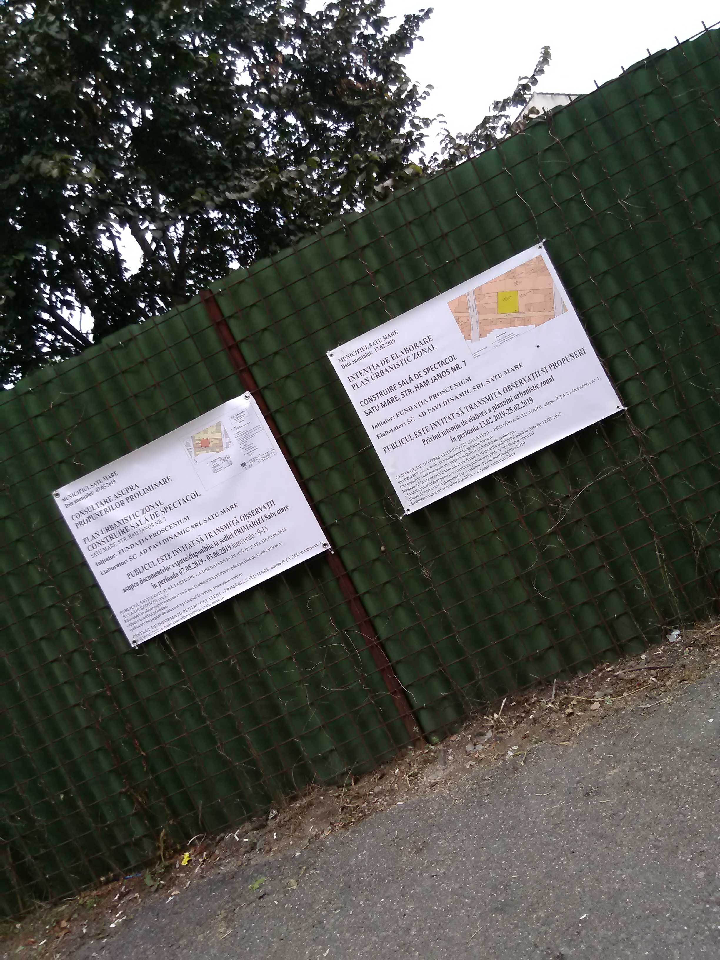 Sinagogă